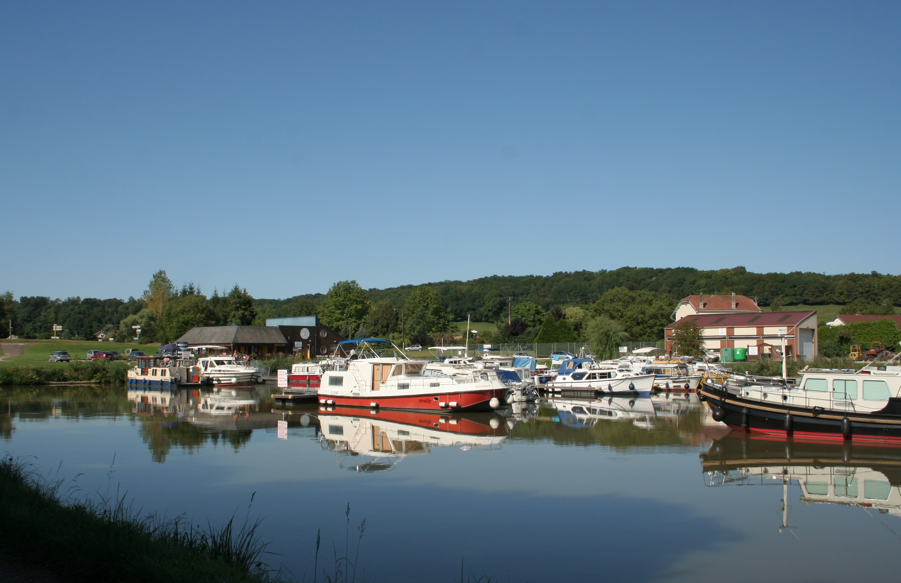 Port de Savoyeux on Saône river (Savoyeux, Haute-Saône, France)